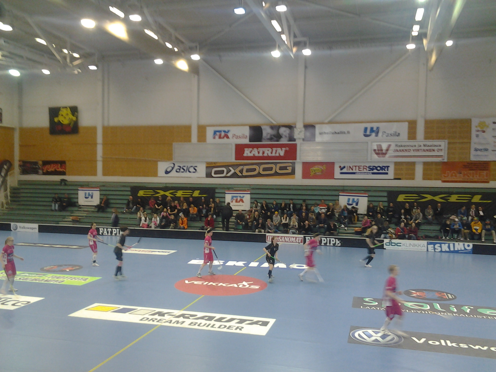 Kuva naisten salibandyliigan ottelusta SB-Pro - Classic (7.4.2013, Pasilan urheilutalo)